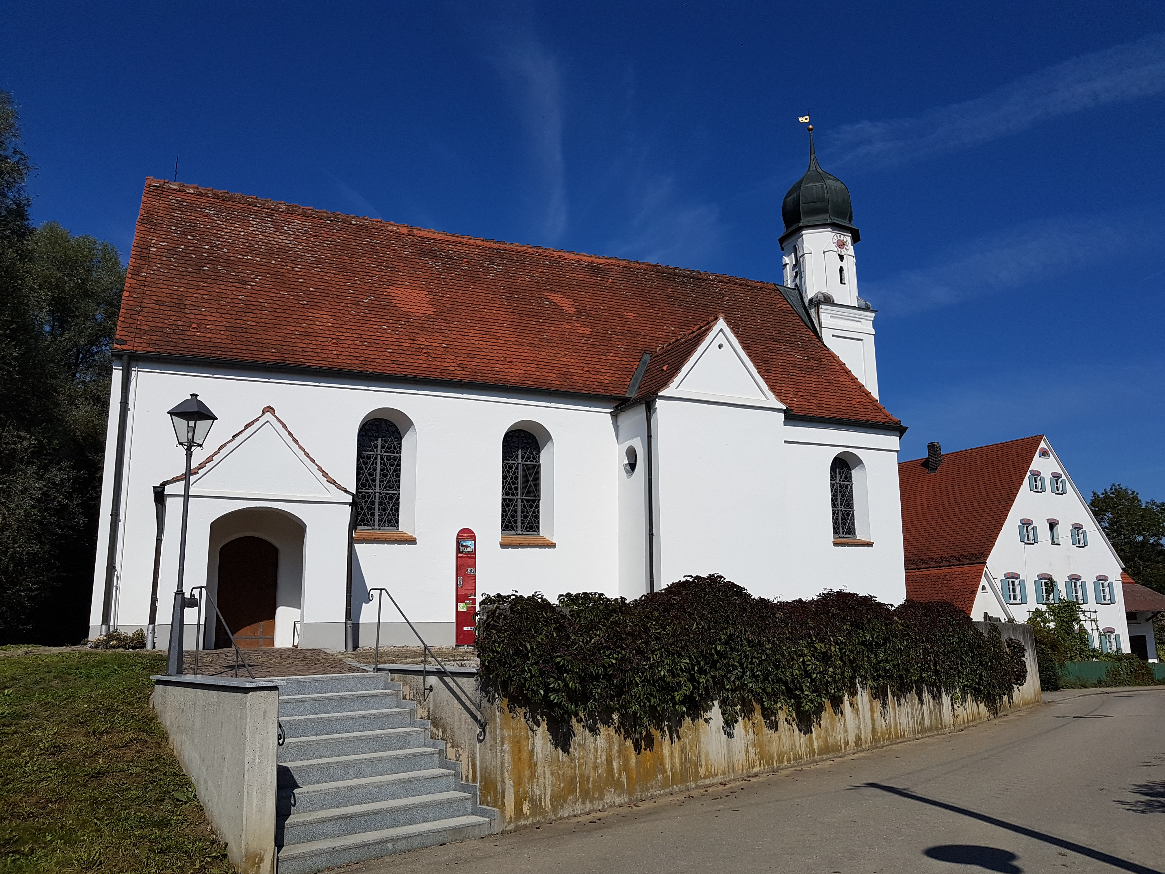 Holzburg (Ried bei Mering), Kirche